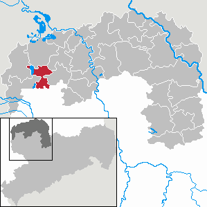 Rackwitz in Saxony - Landkreis Nordsachsen